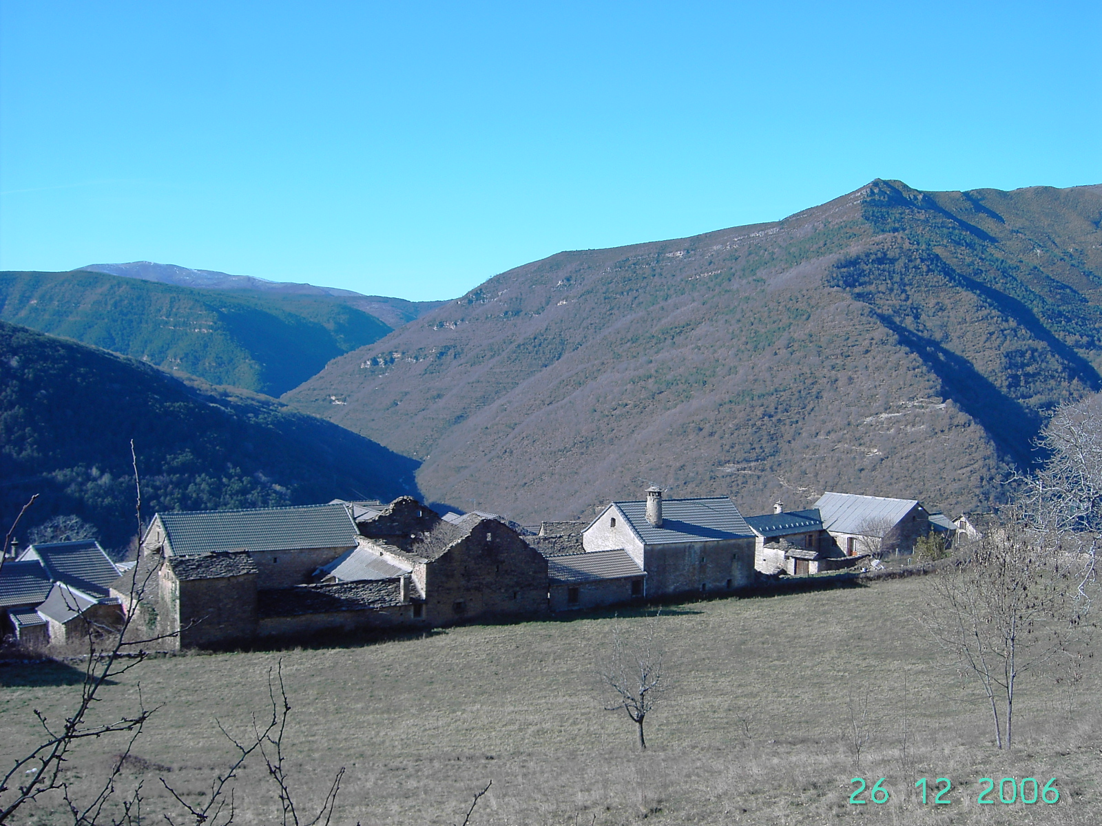 La localidad de Asín de Broto, a más de 1000m de altitud en el Pirineo de Huesca.